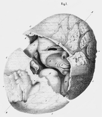 das Steinkind von Leinzell, Zeichnung von W. Kieser